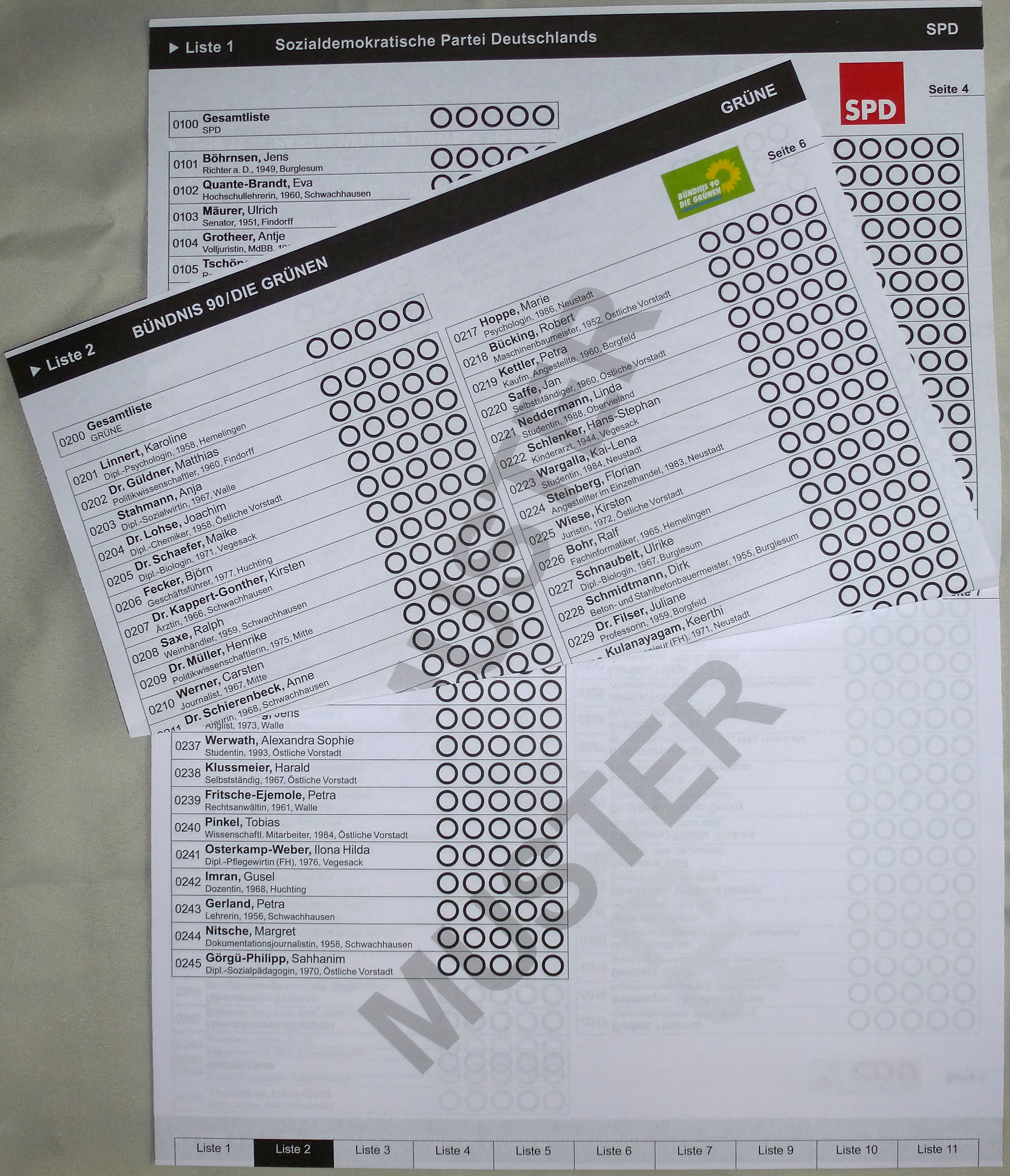 Der „Stimmzettel“ zur Bremischen Bürgerschaft 2015 ist im Wahlbereich Bremen ein DIN A4-Heft mit 18 genutzten Seiten. Er ist in „Leichter Sprache“ verfasst und trägt zur besseren Wiedererkennung auf jeder Liste das zugehörige Logo.